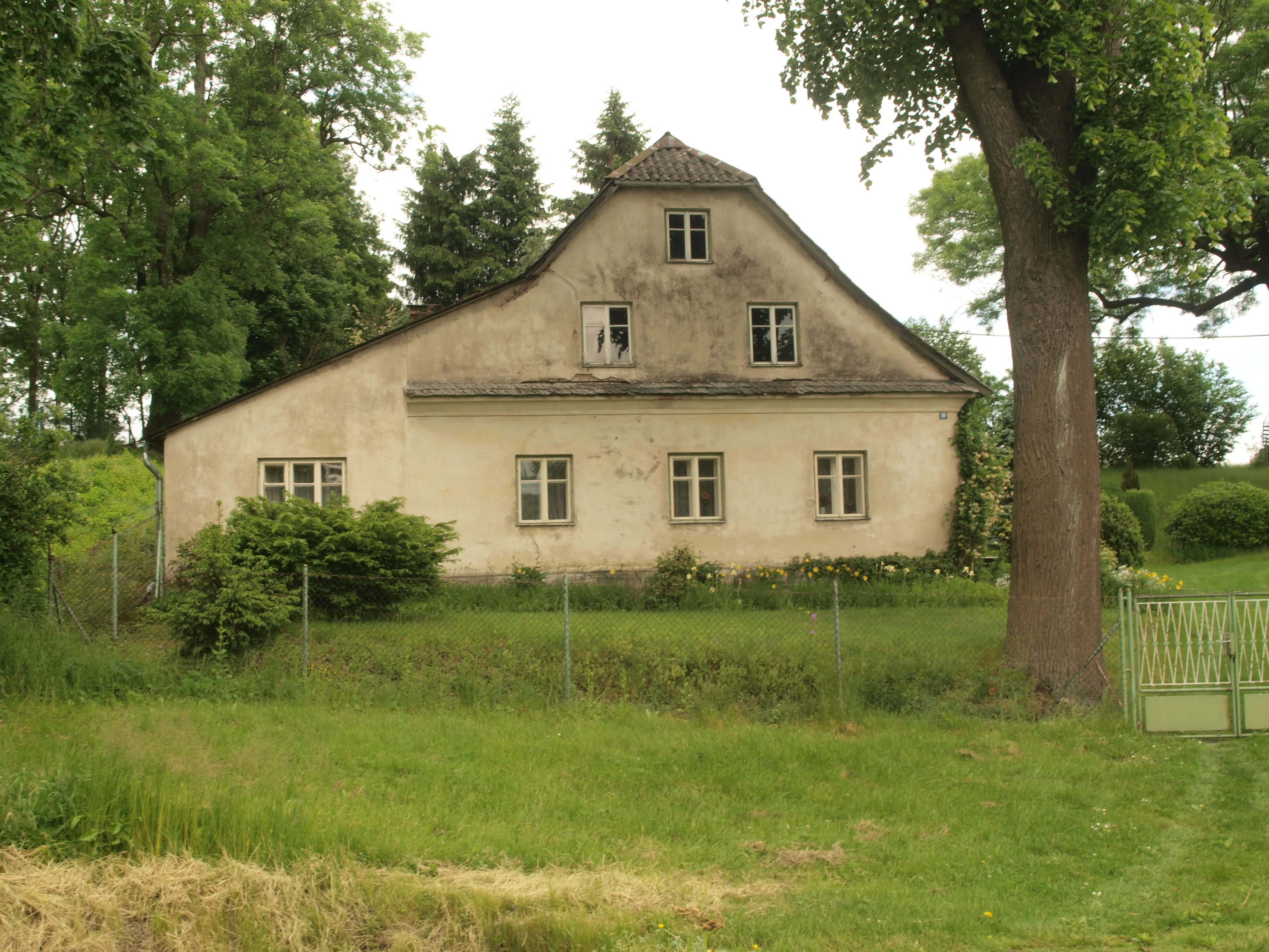 Venkovská usedlost v Ondřejově, místní části Rýmařova